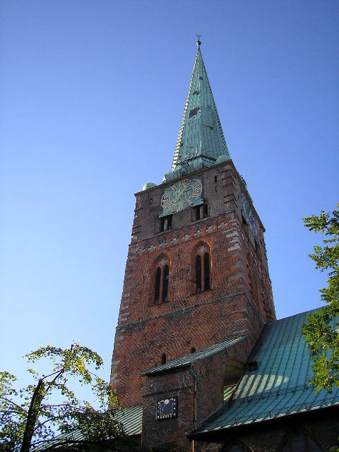 Die Jakobikirche in Lübeck